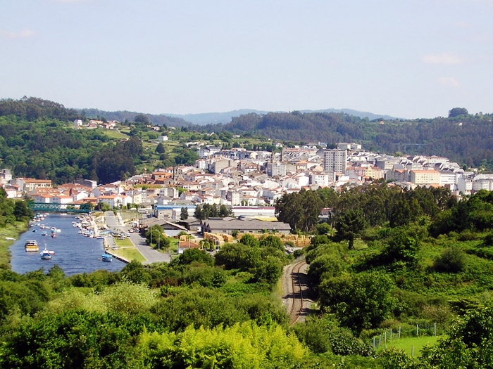 Fotografia de Betanzos presa des de la zona de Castro (carretera de Bergondo)